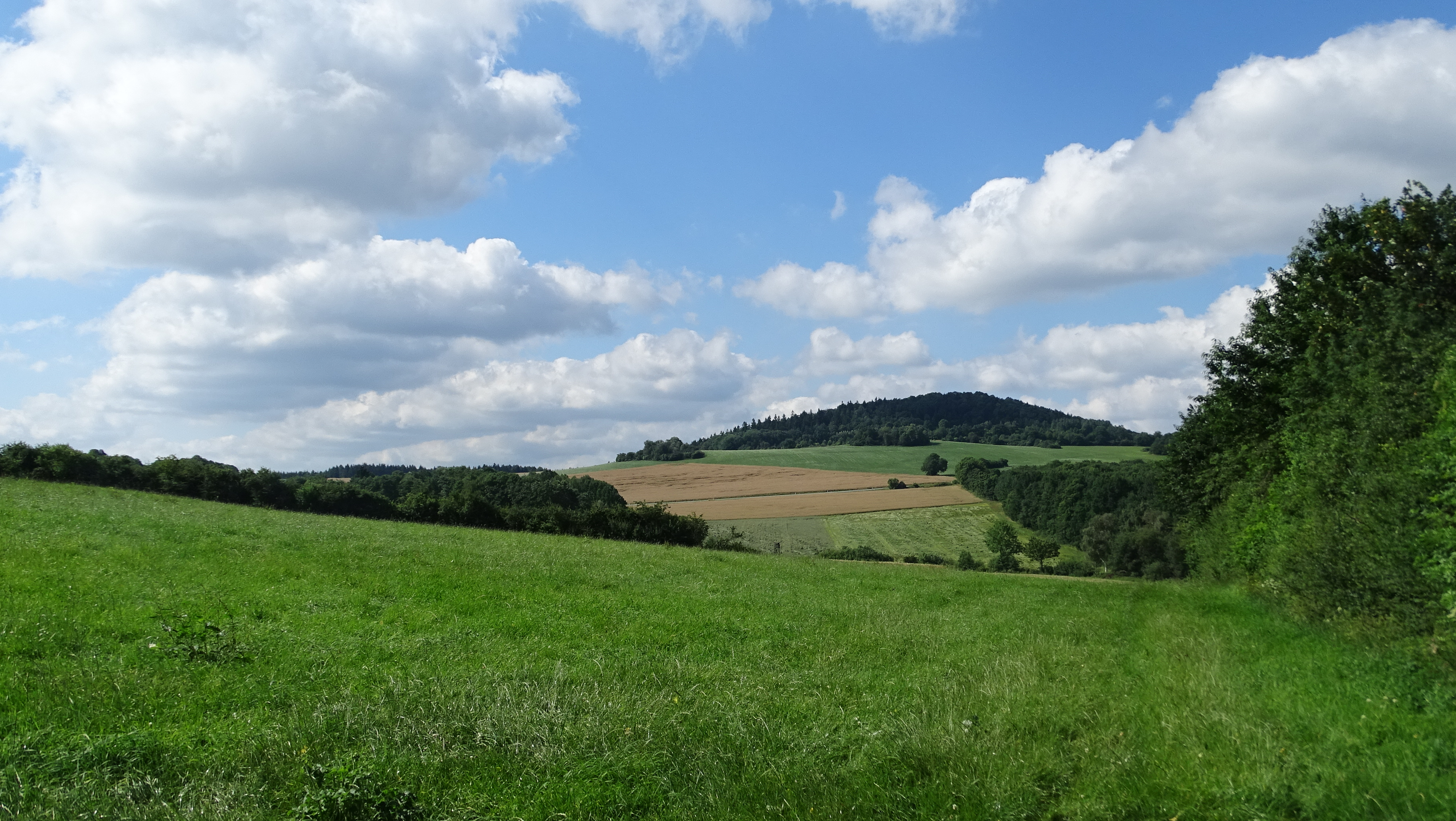 Warnsdorfer Spitzberg, tschechisch Varnsdorfský Špičák, aus Richtung Großer Stein fotografiert.